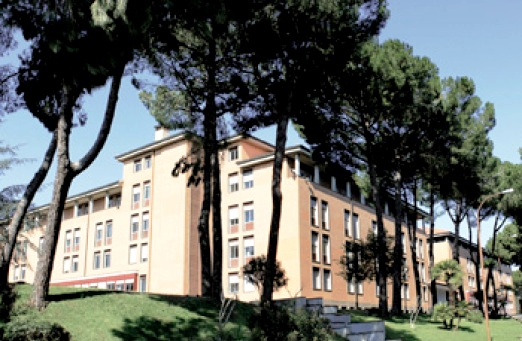 Campus dell'Università degli Studi Niccolò Cusano